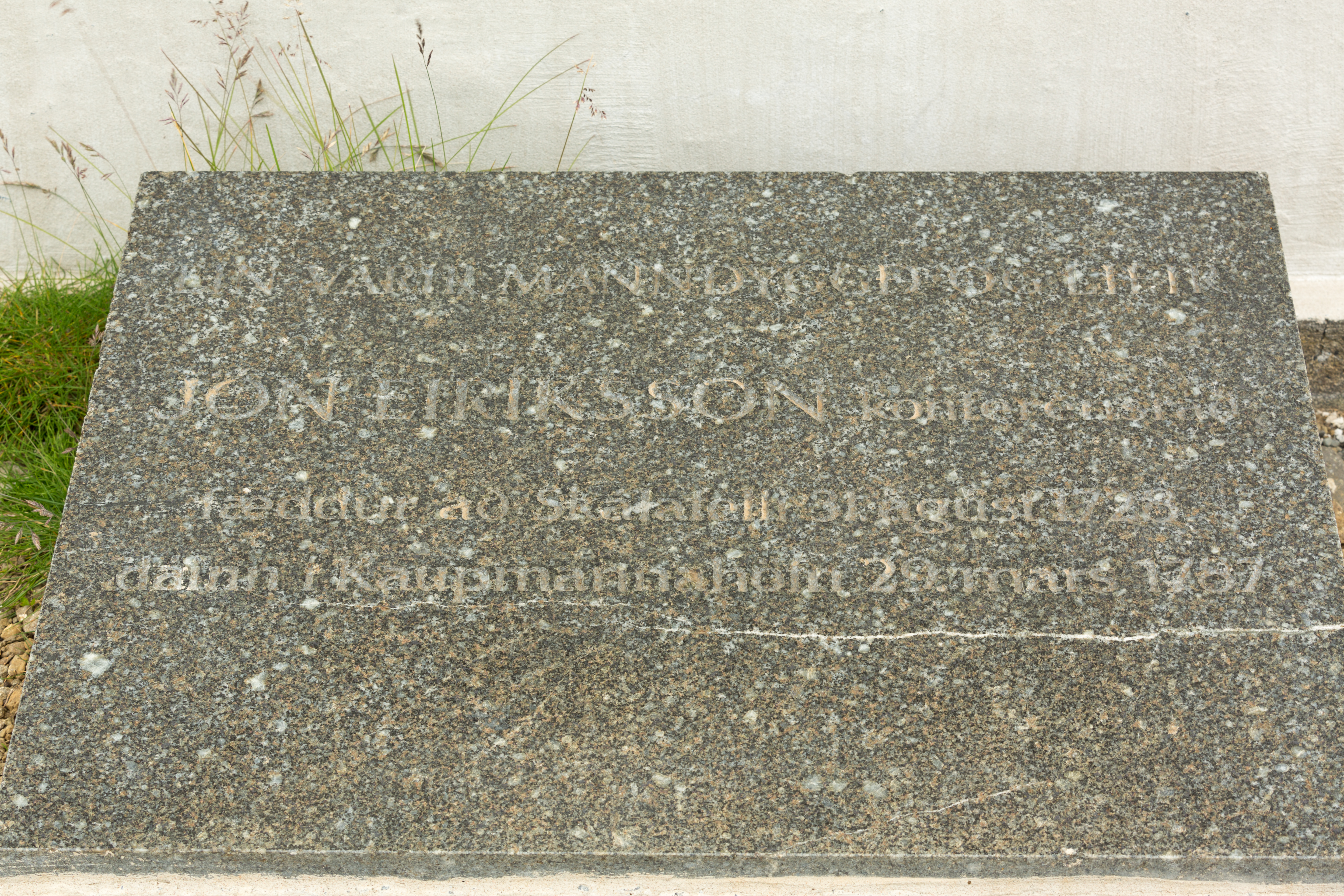 tekst til mindesten for Jon Erichsen